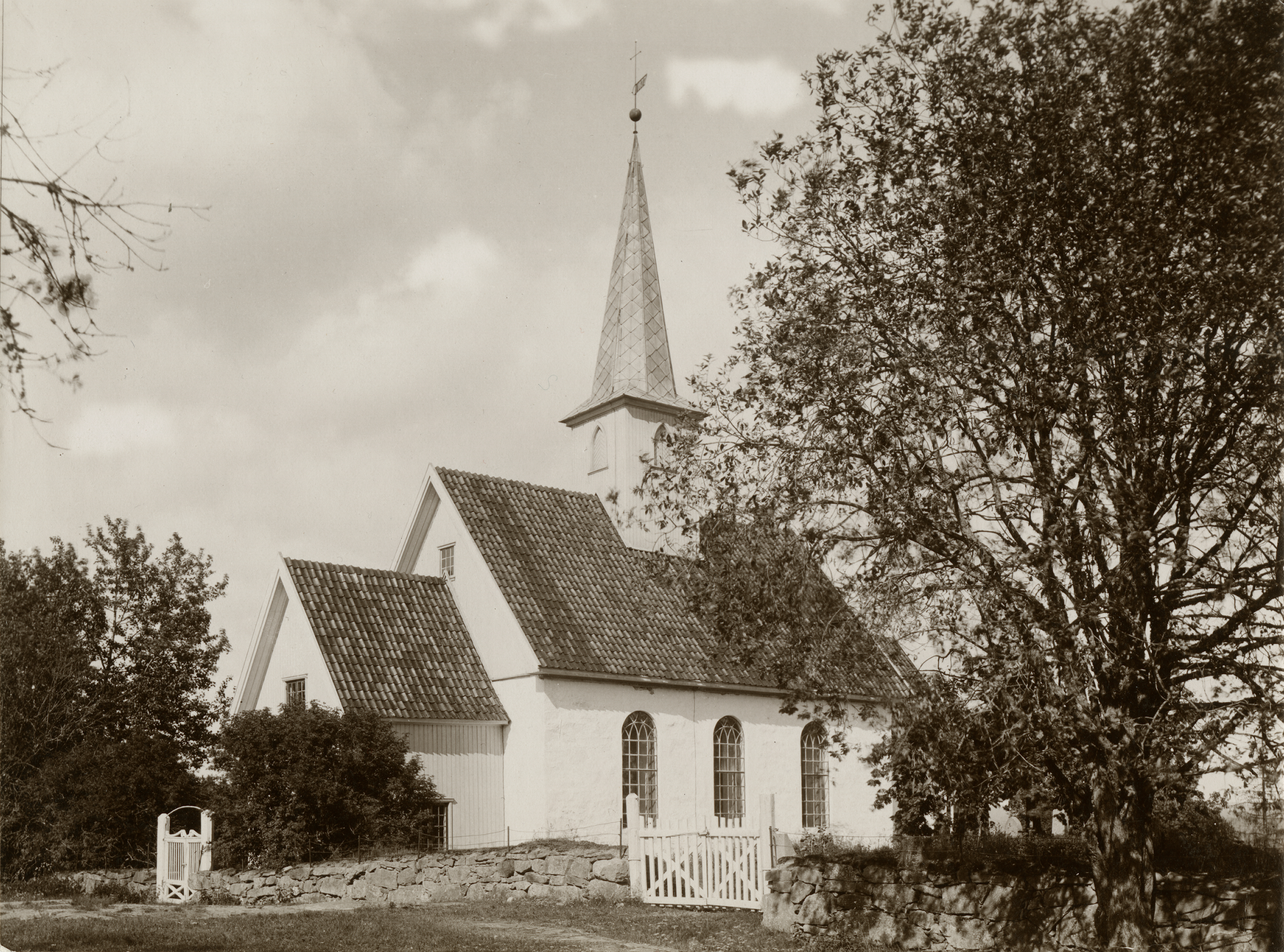 Nesodden kirke i Nesodden, Akershus